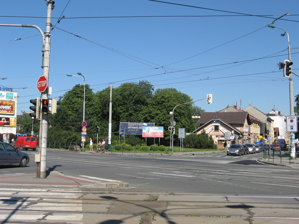 Prostranství na kterém stával hostinec U Koule v dnešní podobě